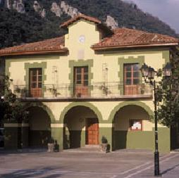 Ayuntamiento de Santo Adriano.